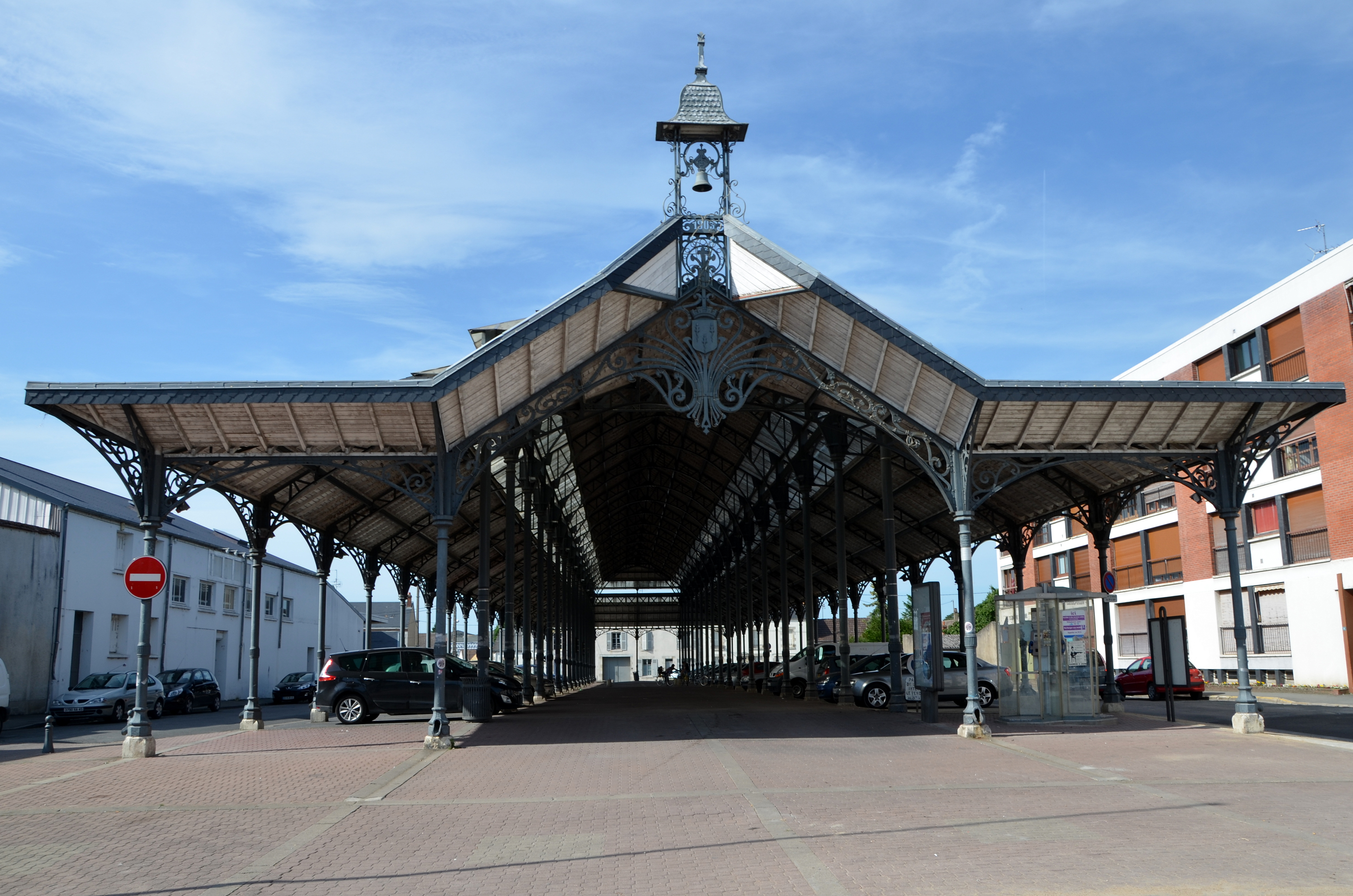 Halles de Chateauneuf sur Loire, Loiret, France